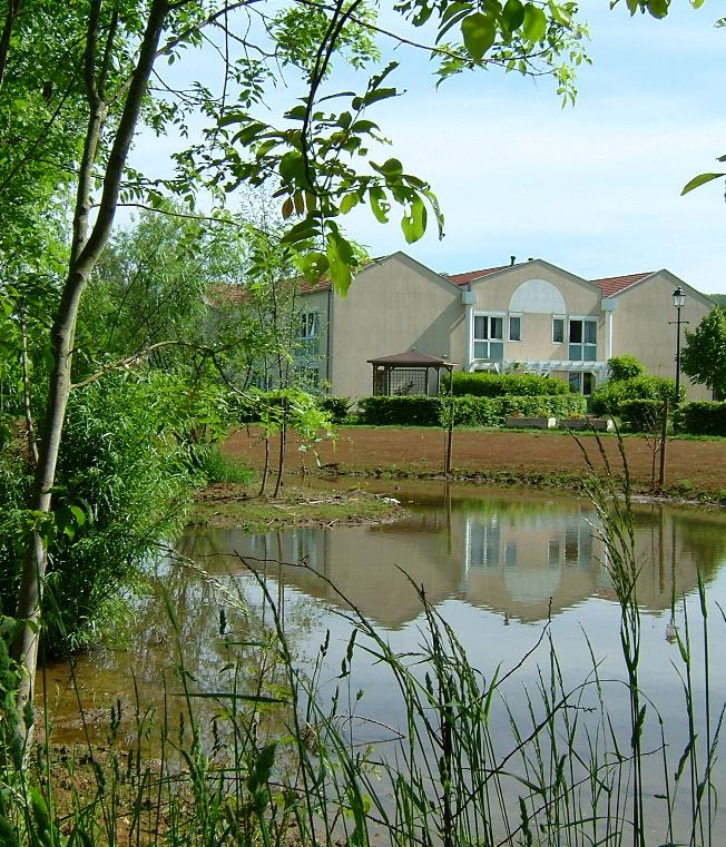 D'Käler Baach virum Vitalhome.